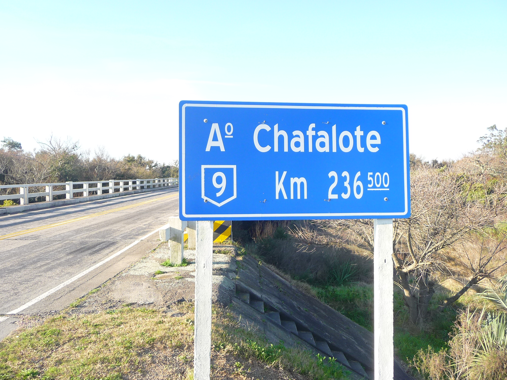 Puente sobre la ruta nacional número 9